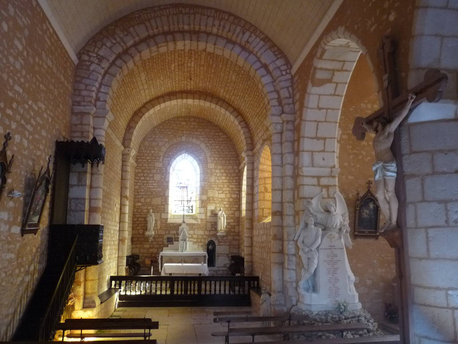 intérieur de l'église de Chenon, Charente, France